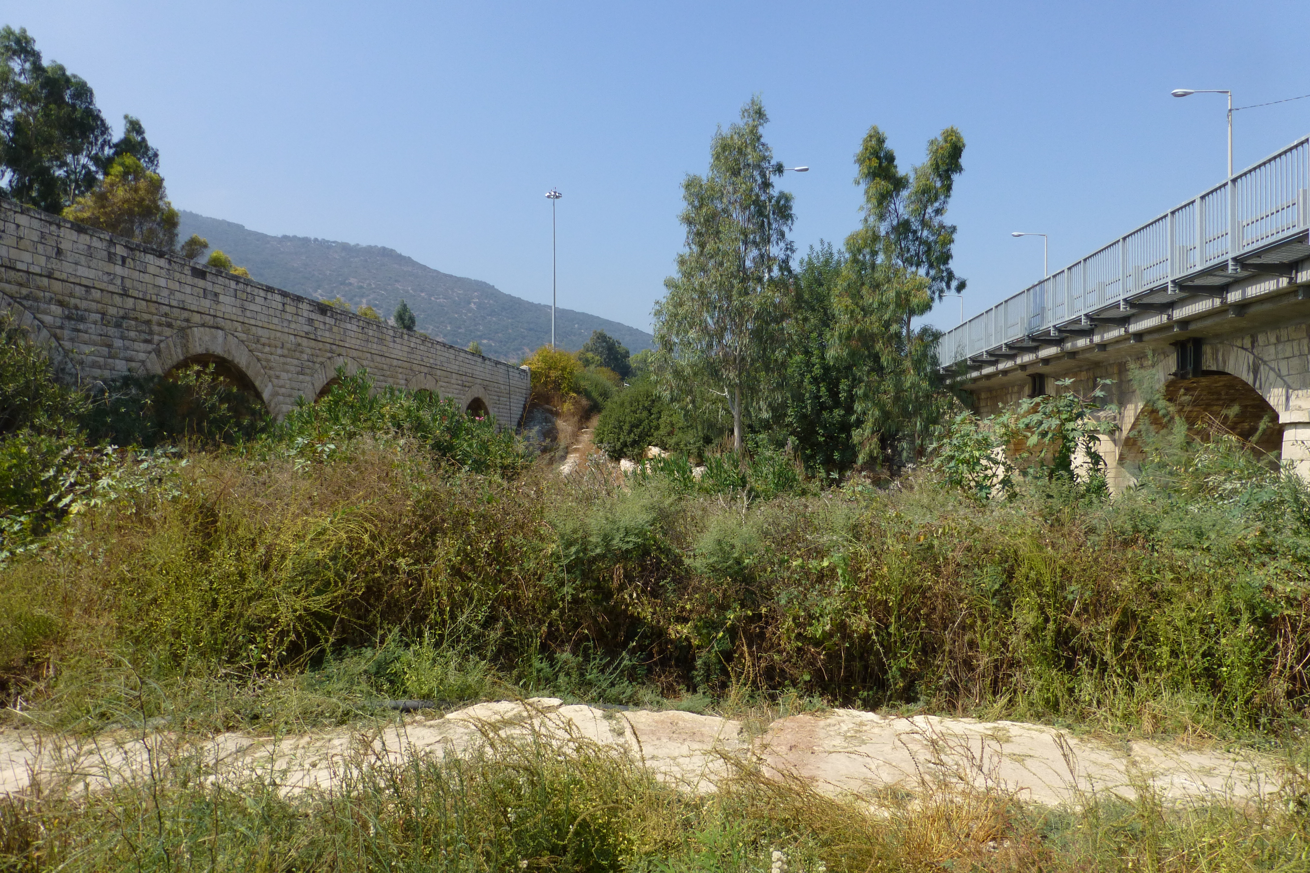 רכבת העמק - מעבירי מים והסוללה - צומת העמקים